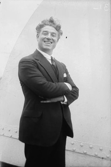 Giovanni Martinelli (1885 – 1969), Italian singer, operatic tenor